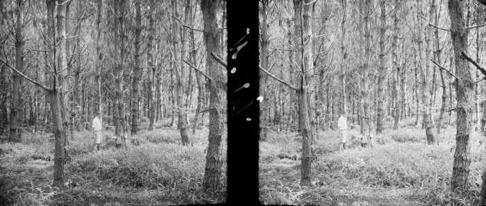 Stereonegatief. Herbebossing op de hoogvlakte van Sumatra's Oostkust; elf jaar oude Pinus kesiya cultuur